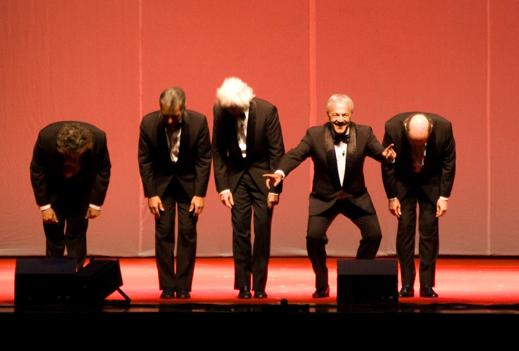 Asi partió su show, con la reverencia inicial y las payasadas de Daniel Rabinovich. Les Luthiers en Los Premios Mastropiero